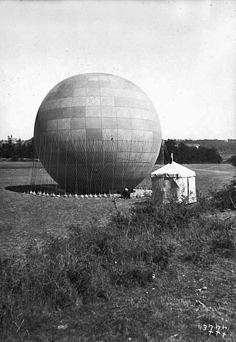 Parc aérostatique à Ormancey (Haute-Marne), ballon gonflé retenu à terre : photographie de presse Agence Rol